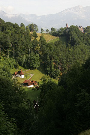 Flüeli-Ranft: Blick in die Ranft mit Oberer Ranft-Kapelle und Sigristenhaus